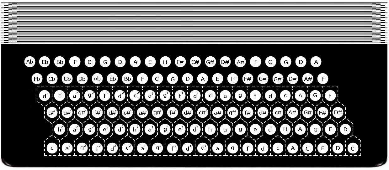 Схема расположения клавиш левой руки клавиатуры системы Кравцова